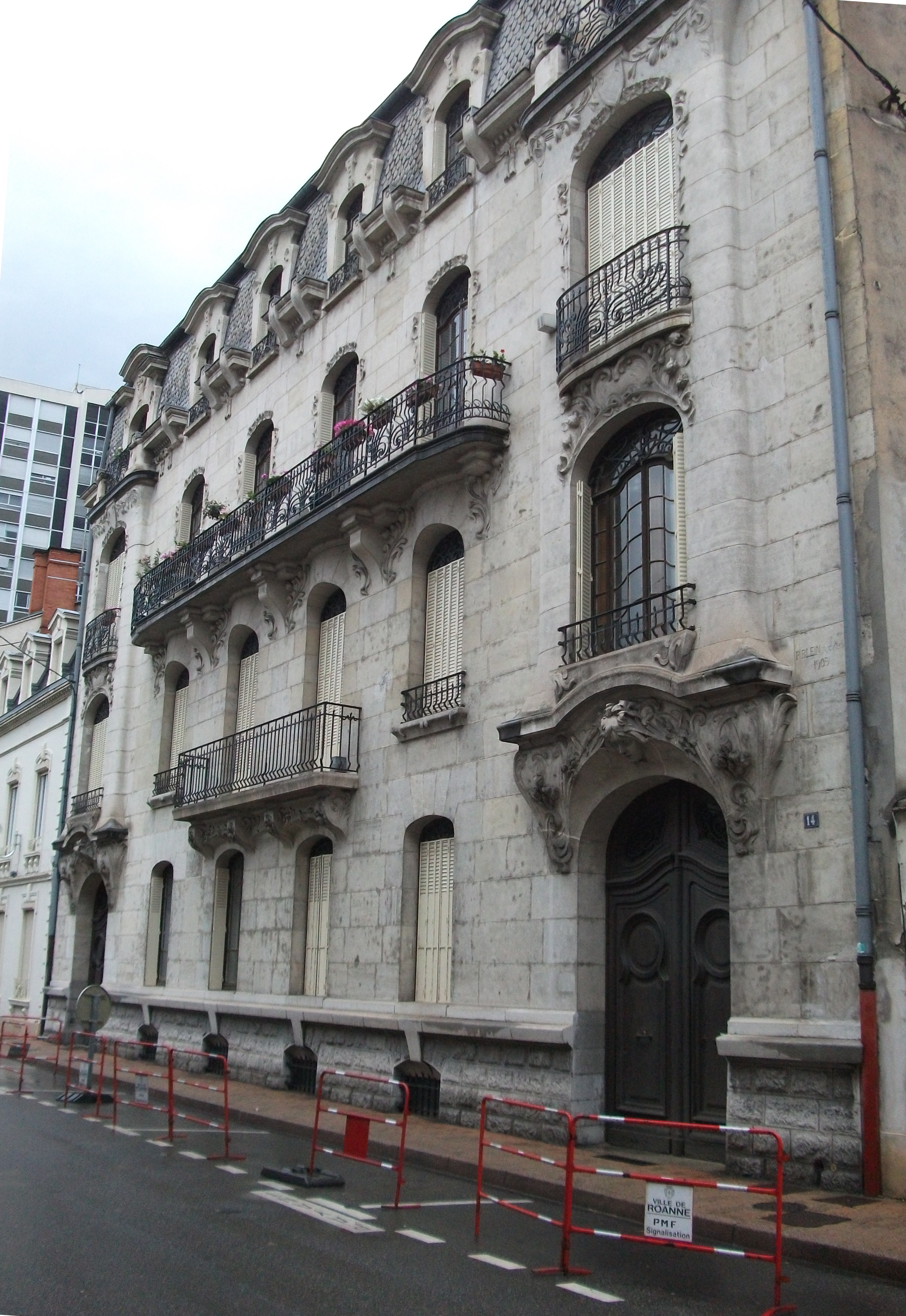 Immeuble, 14 rue Beaulieu (Inscrit, 1989)